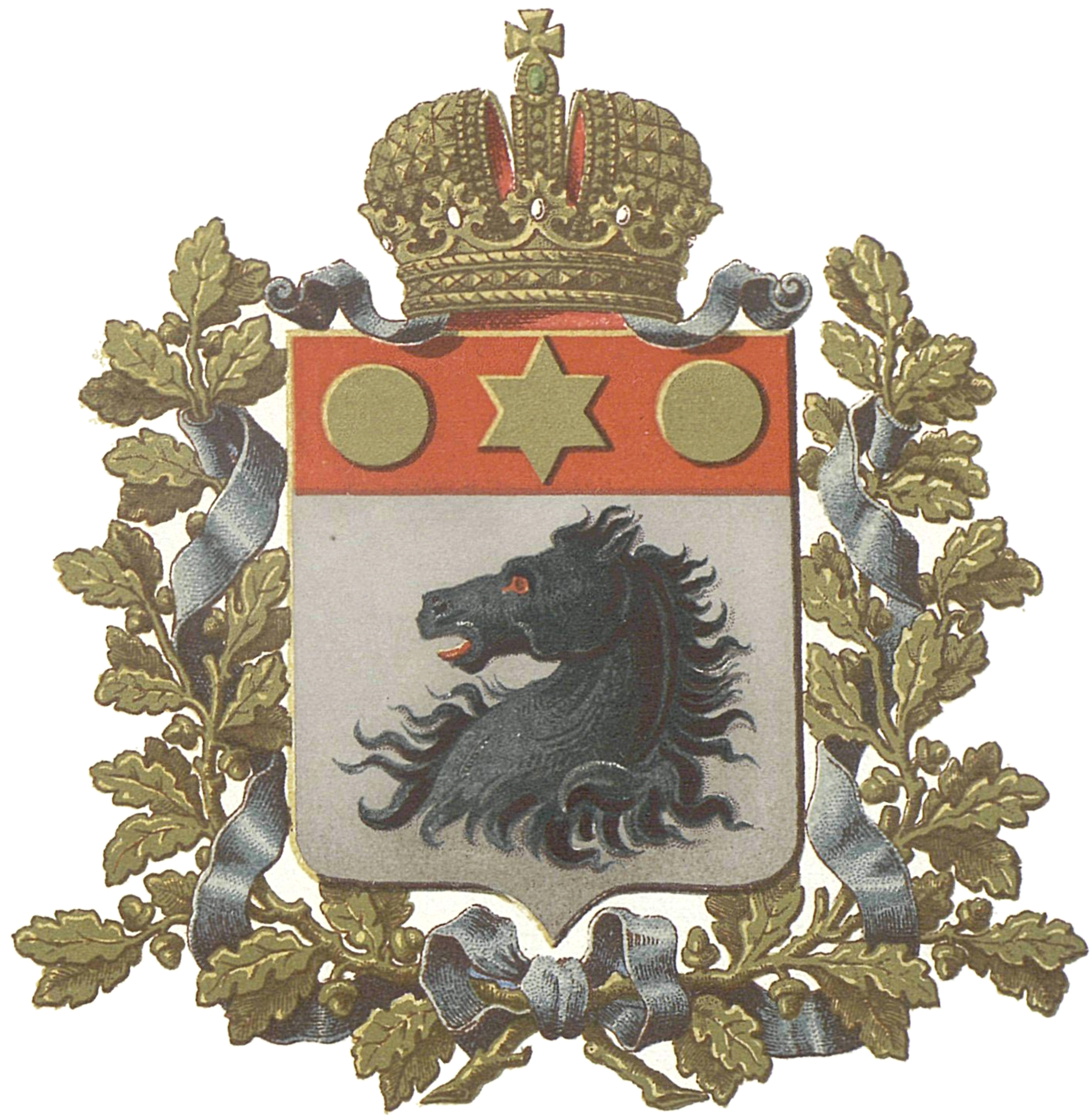 Official Russian Empire coat of arms Kharkov Governorate. Герб Российской Империи Харьковской губернии в Гербовнике Министерства внутренних дел Российской Империи. Утверждён Императором Всероссийским Александром Вторым.